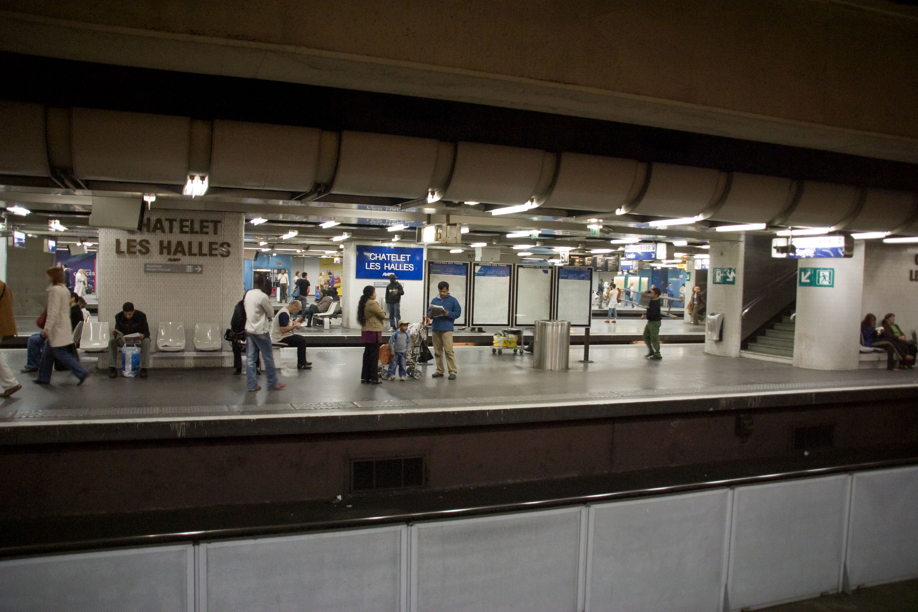 Station Châtelet - Les Halles, Paris, France